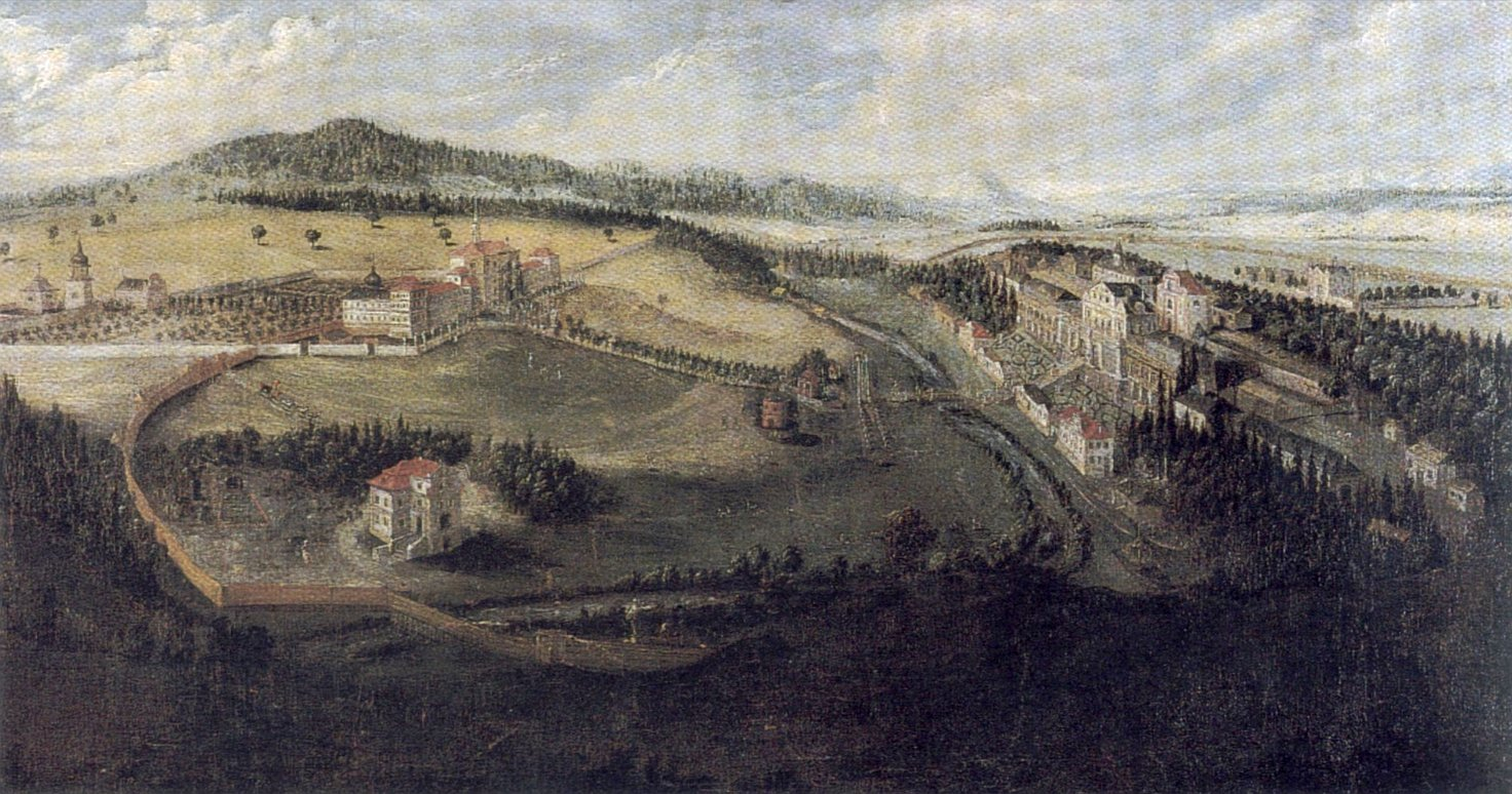 Střední část obrazu Pohled na Kuks od východu, po roce 1724, olej na plátně, ze sbírek špitálu v Kuksu